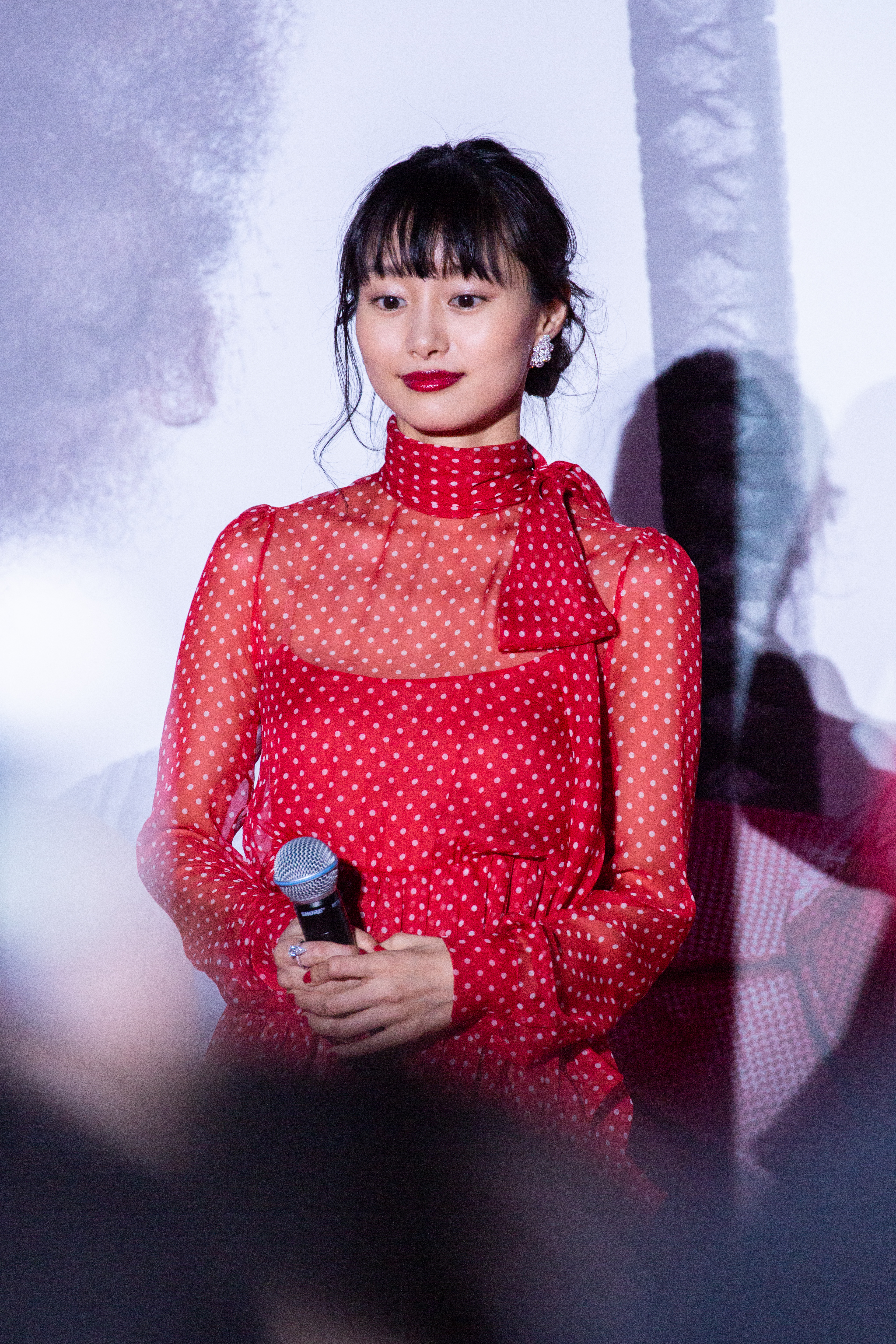 デッドプール2 ジャパン・プレミア レッドカーペット 忽那汐